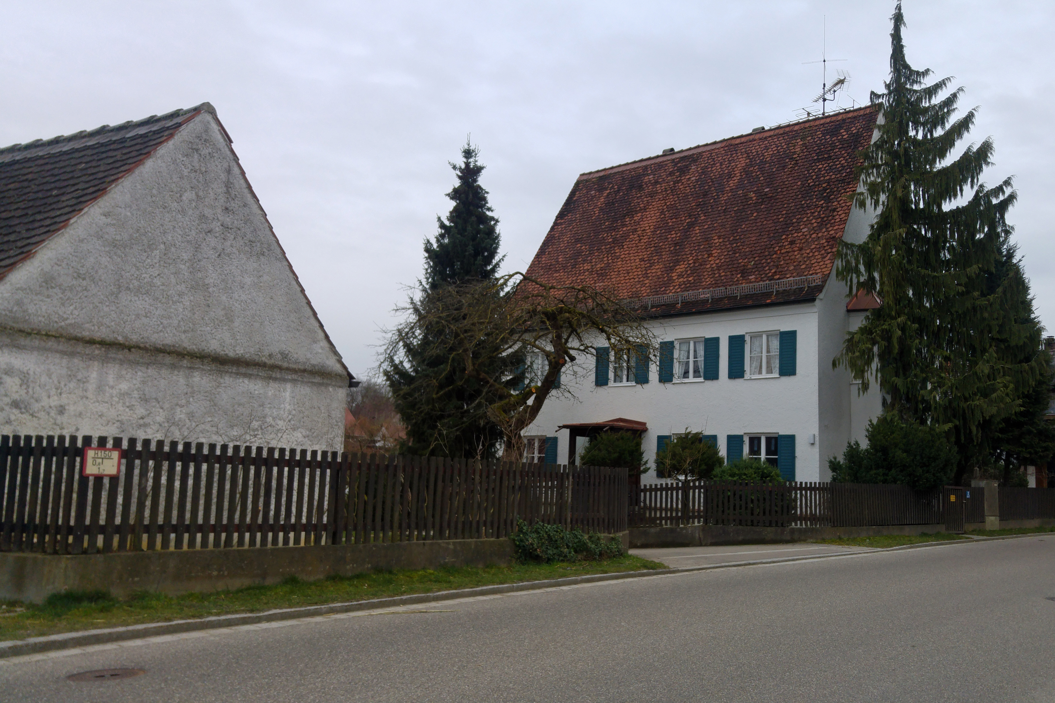 Baudenkmal in Igenhausen Aktennr. D-7-71-140-6